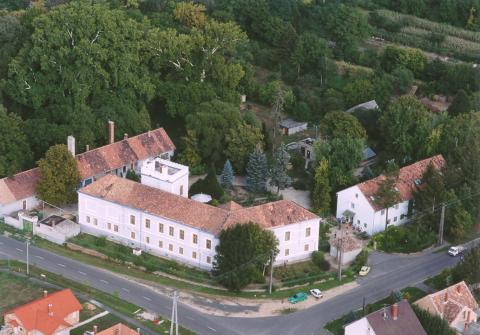 Sajtoskál, Hungary, aerialphotography